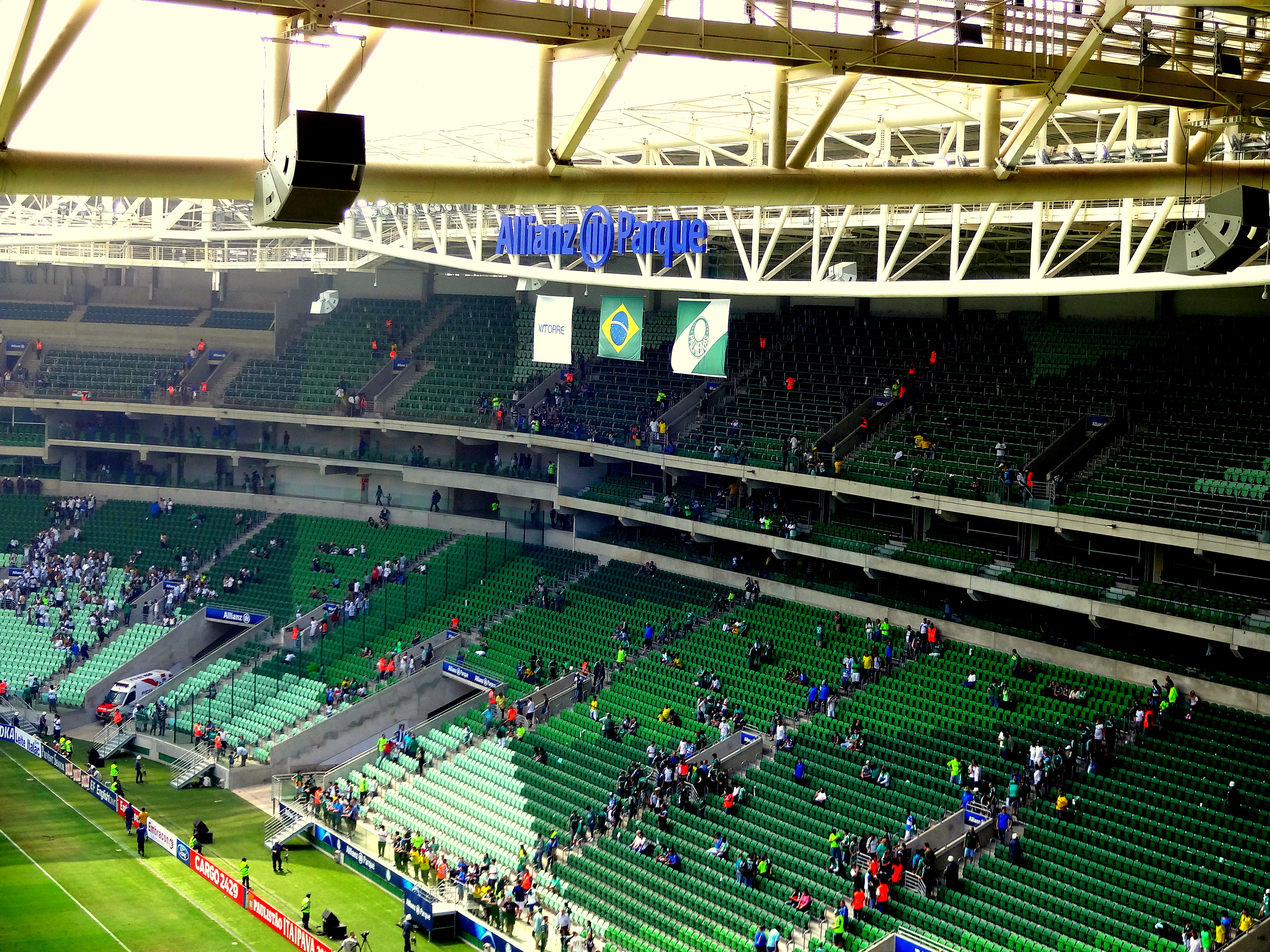 Palmeiras 1 x 0 Botafogo SP - Paulistão Itaipava 2015